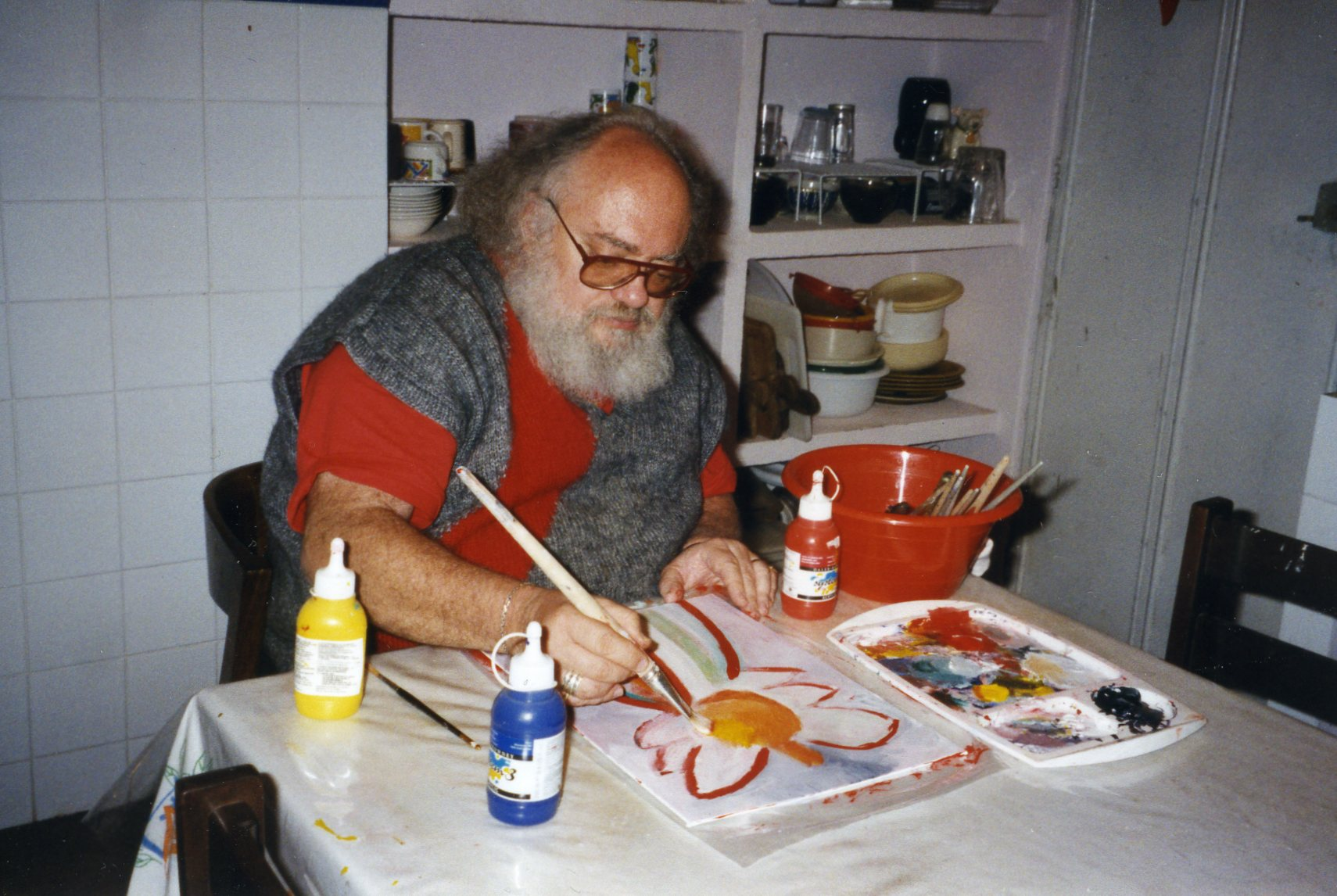 Zipacná de León pintando.